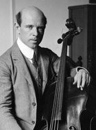 Pablo Casals